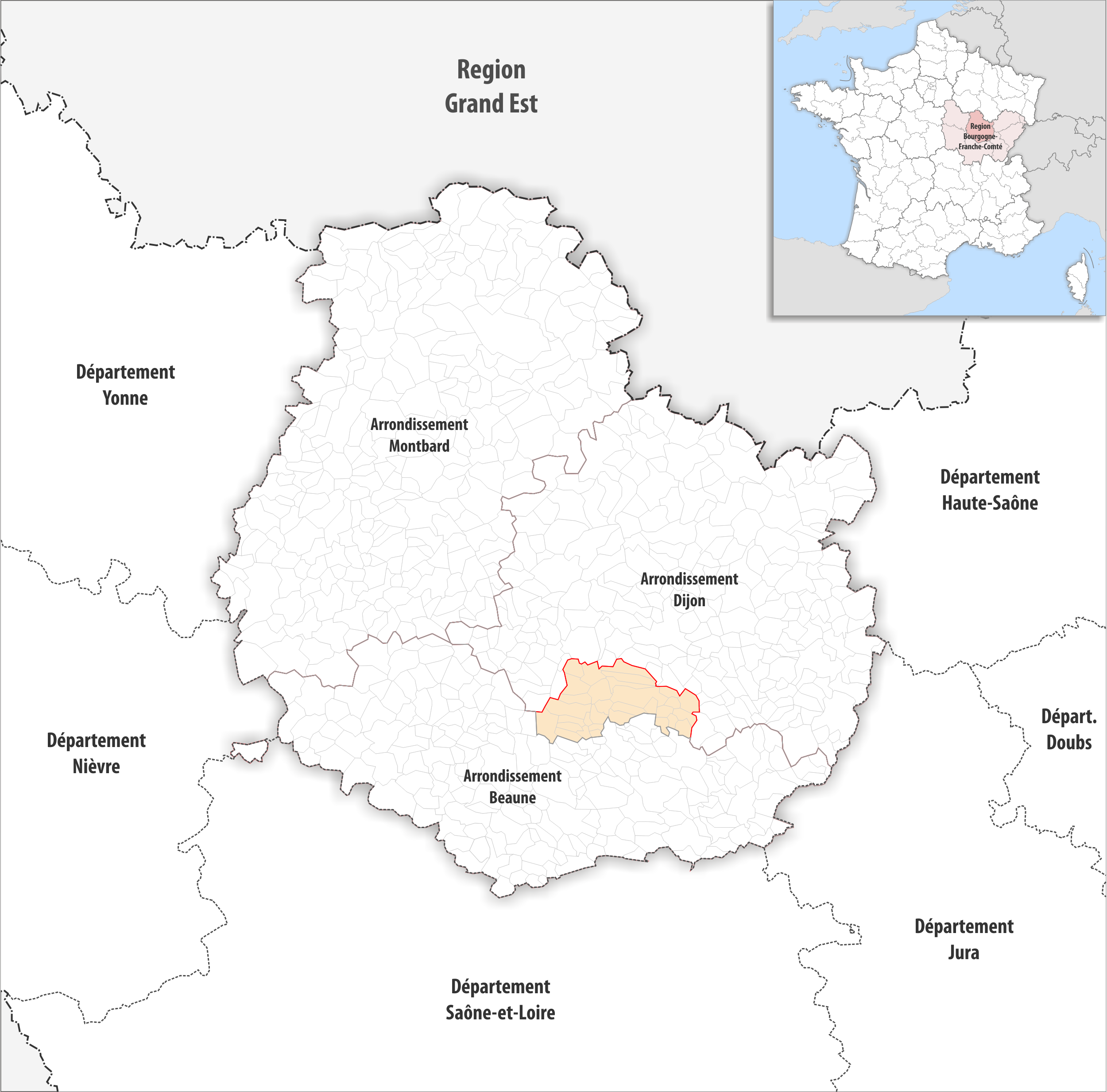 Arrondissements Anpassungen auf 2017 im Departement Côte-d’Or